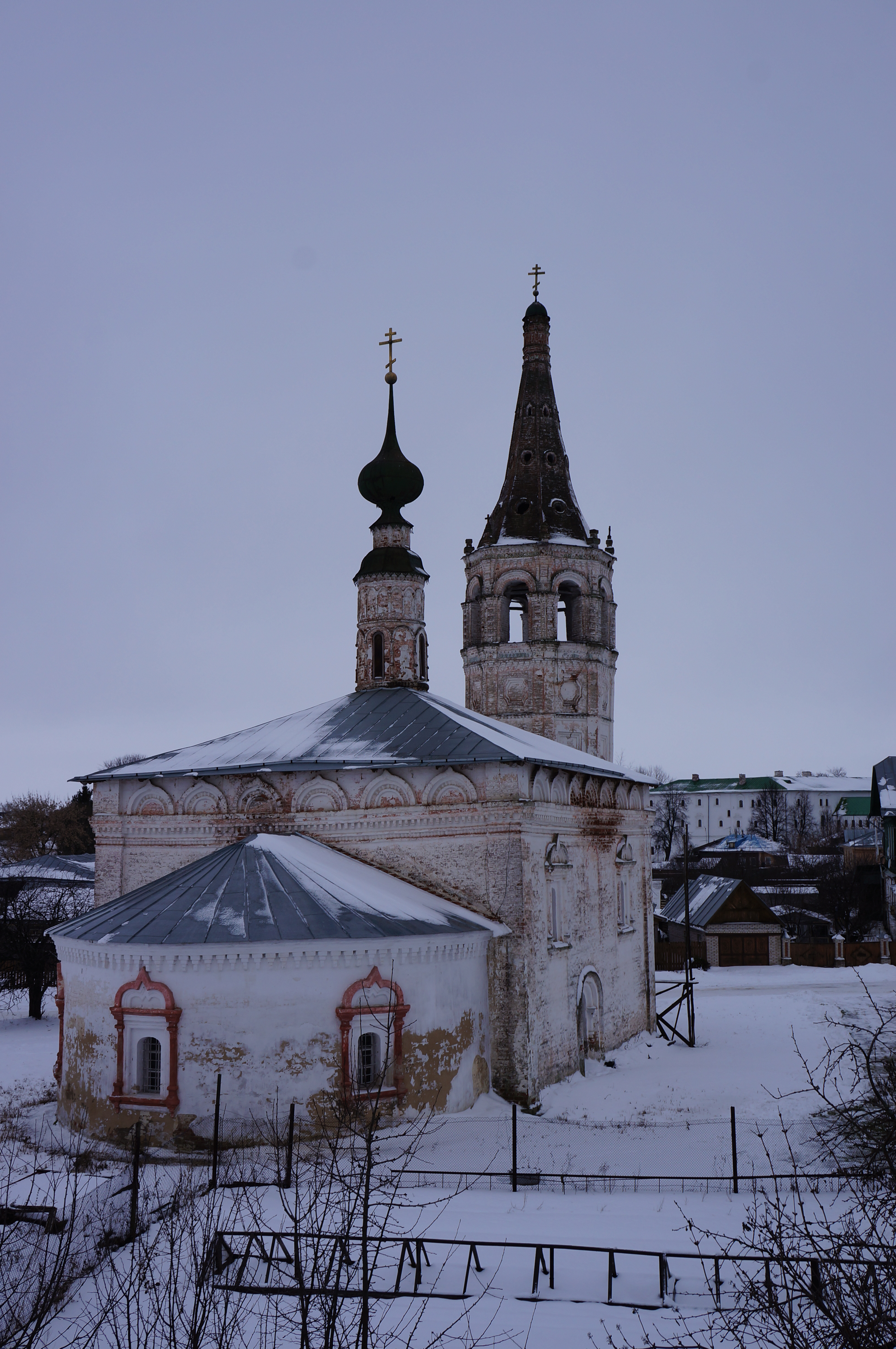 Суздаль. Никольская церковь (1720 год)